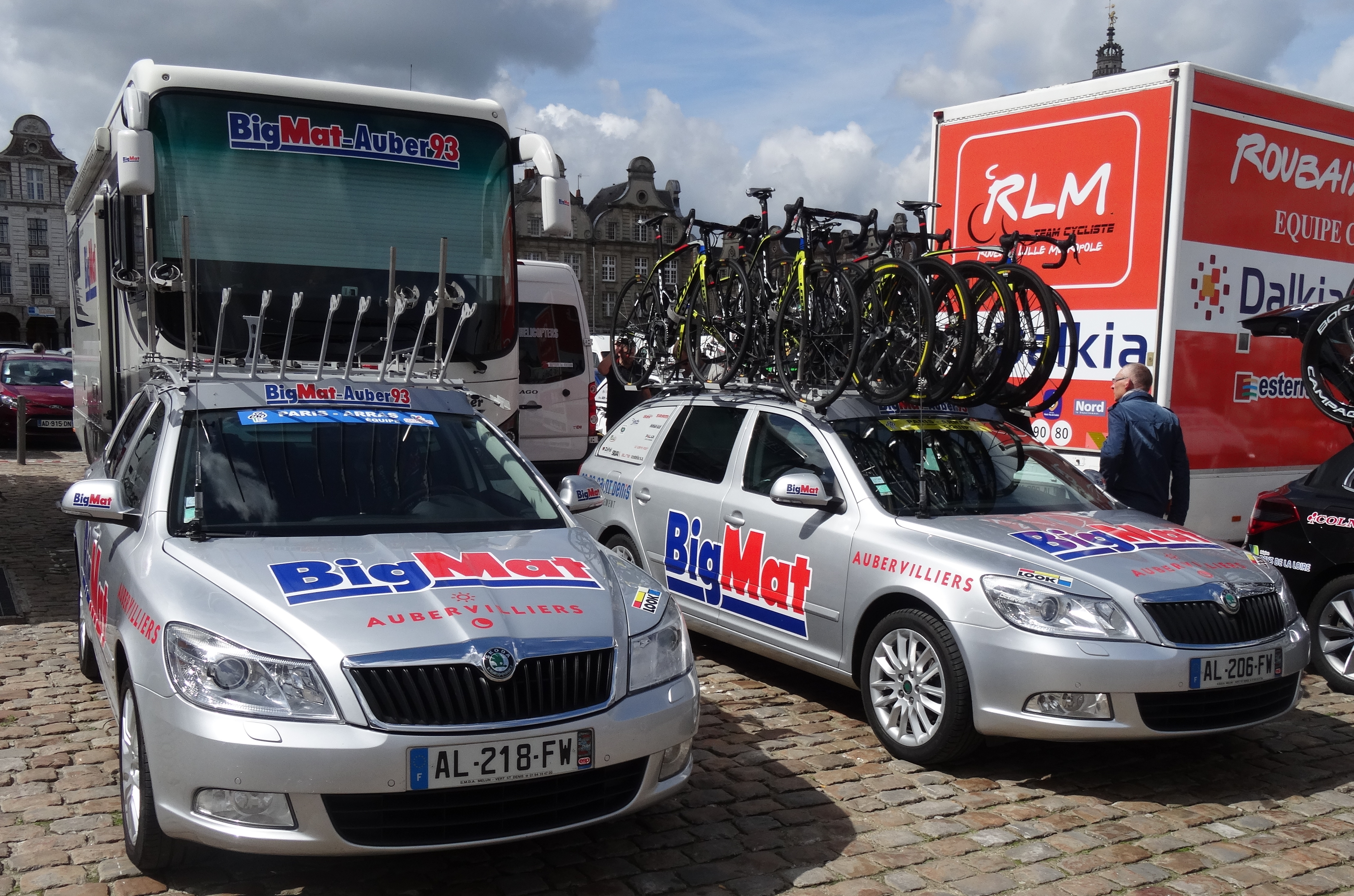 Reportage photographique réalisé le dimanche 25 mai 2014 à l'occasion du départ et de l'arrivée de la troisième étape du Paris-Arras Tour 2014 à Arras, Pas-de-Calais, Nord-Pas-de-Calais, France.